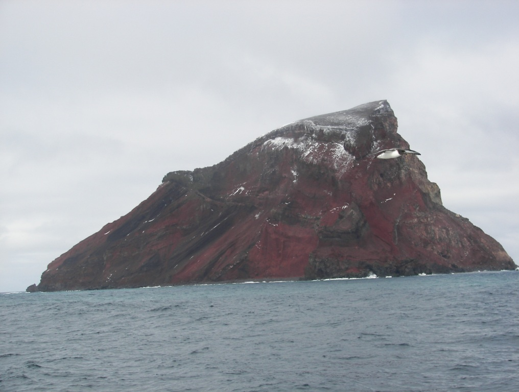 Petrel Damero sobrevuela isla Bridgeman